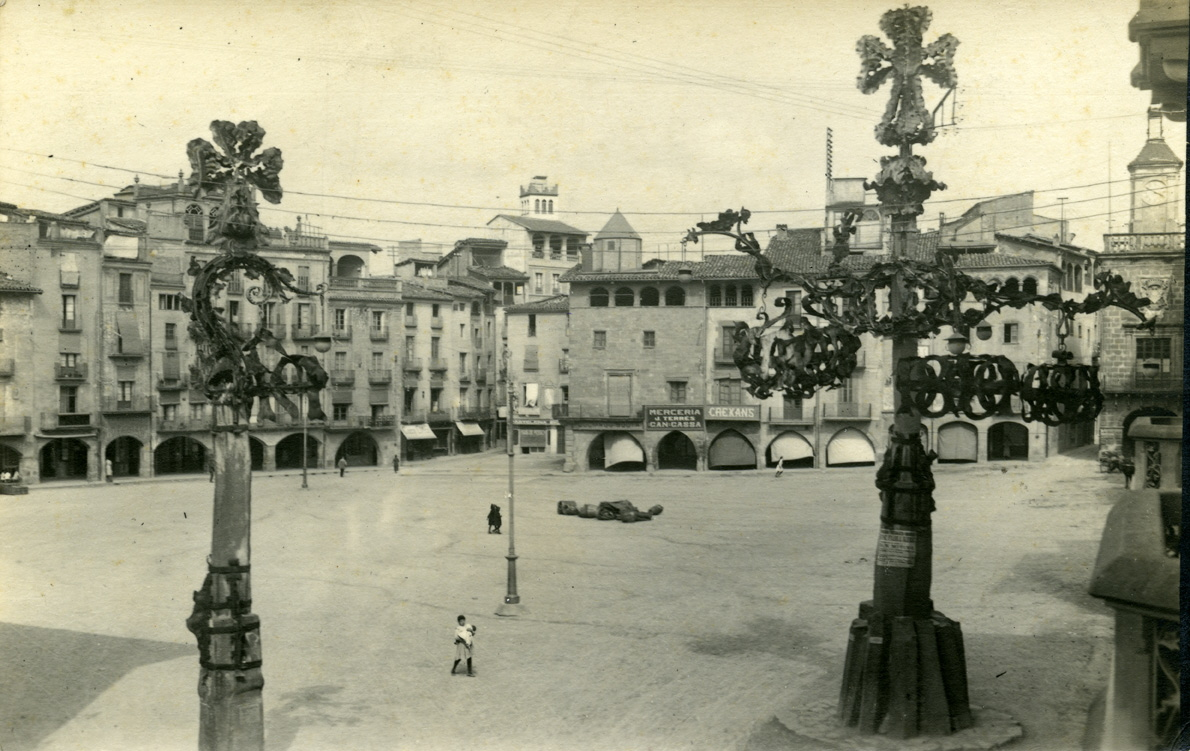 Farolas de Vic, obra de Gaudí de 1910, deribadas en 1924.